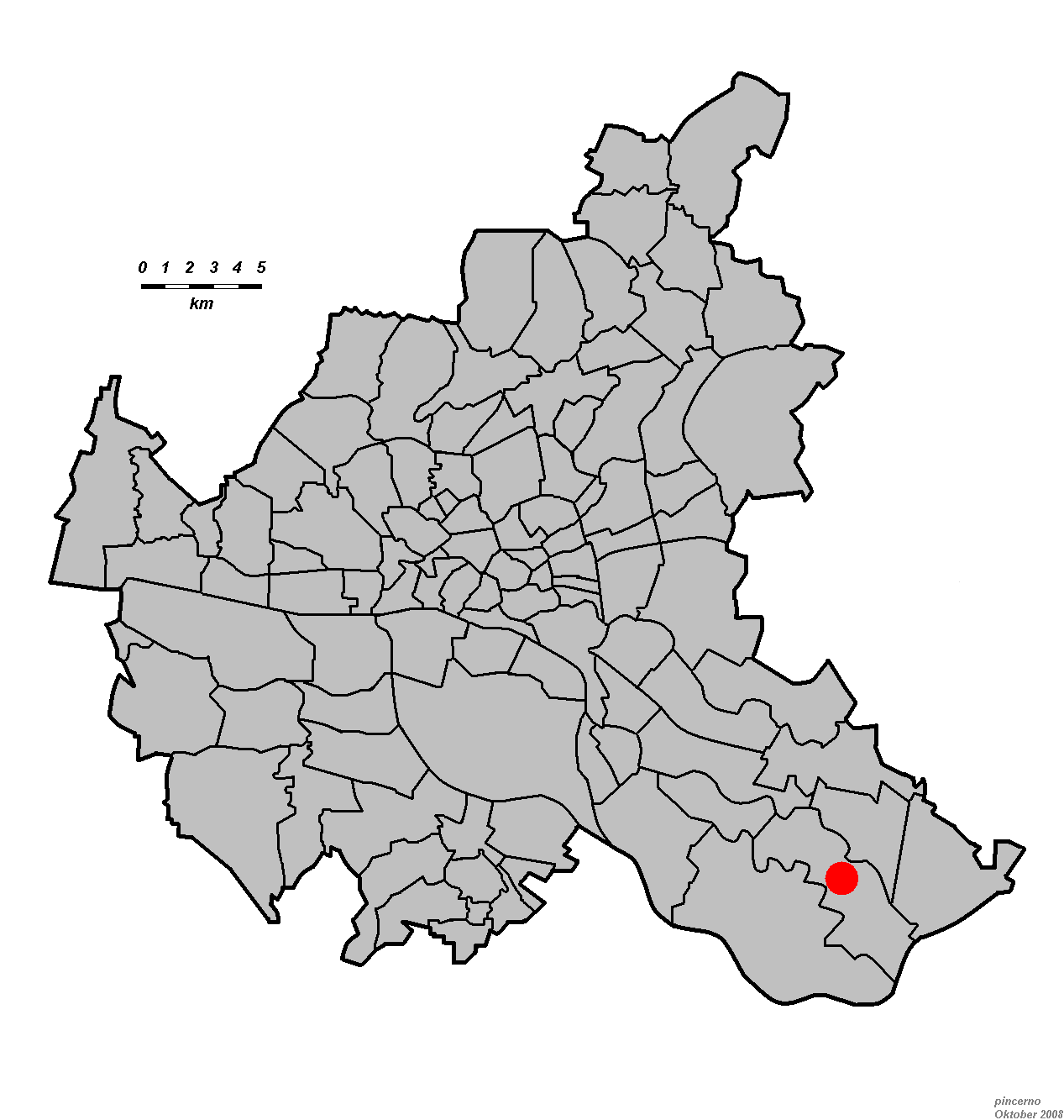 Lage des KZ Neuengamme in Hamburg.